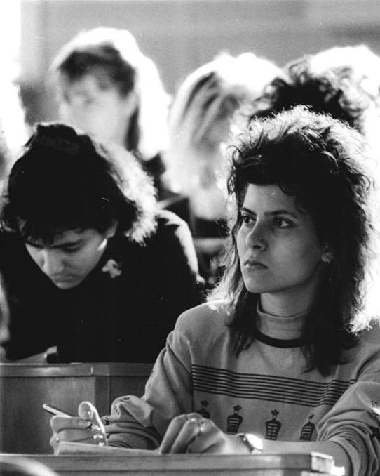 Berlin, bulgarische Gaststudentin an der HU ADN-ZB Uhlemann 21.4.89-We-Berlin: Studententage-Maria Kanewa aus der VR Bulgarien ist Studentin an der Sektion Germanistik der Humboldt-Universität. Gegenwärtig studieren an dieser Sektion rund 200 ausländische Studenten, u.a. auch aus der Sowjetunion, Polen, Finnland, Spanien, Korea, Italien und Frankreich.